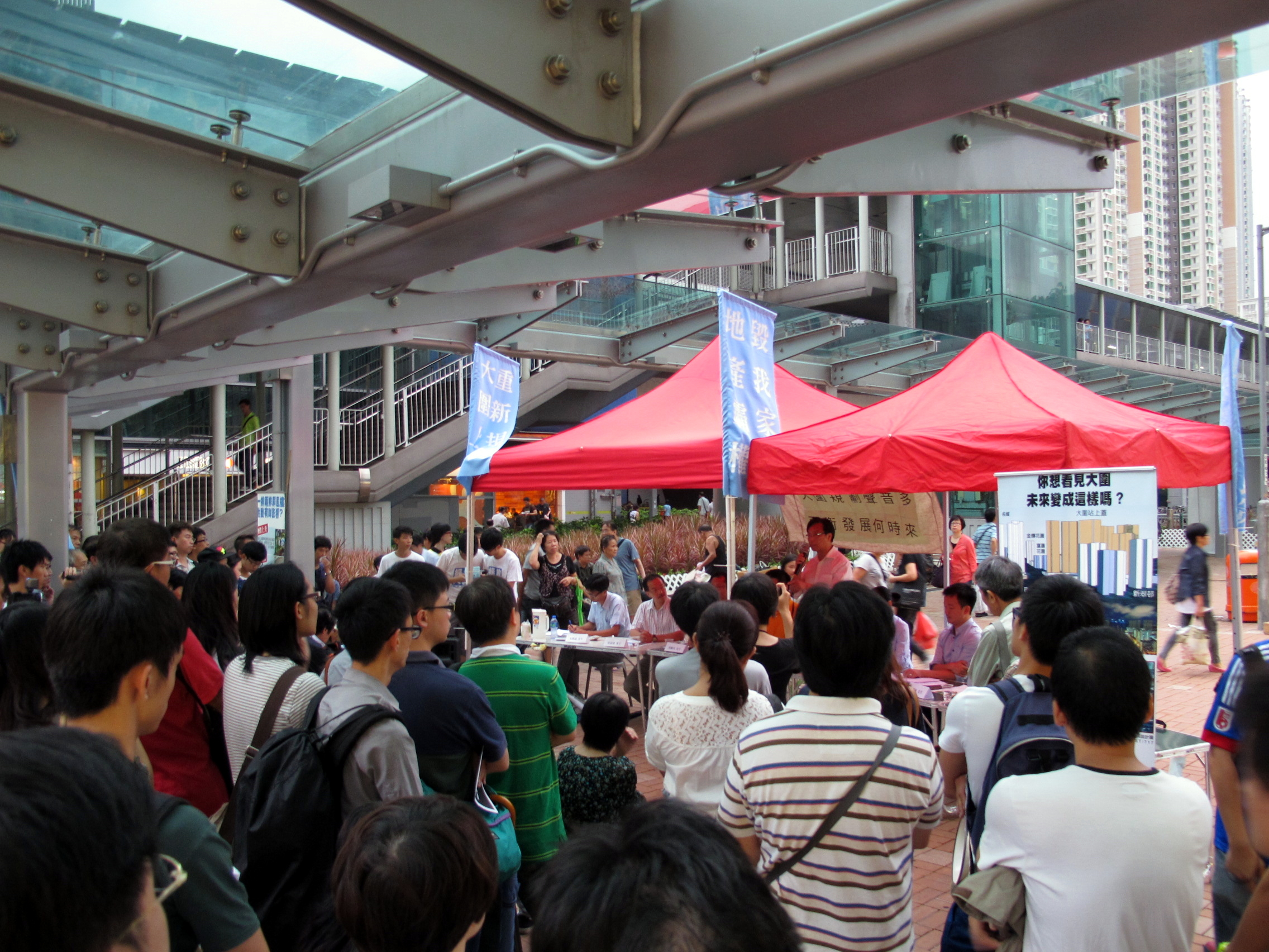 反大圍站上蓋建屏風樓關注組在2012年7月舉辨「大圍規劃聲音多 平衡發展何時來？」論壇